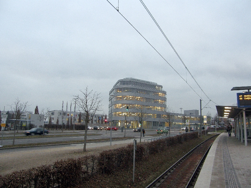 Bilder aus dem Scharnhauser Park